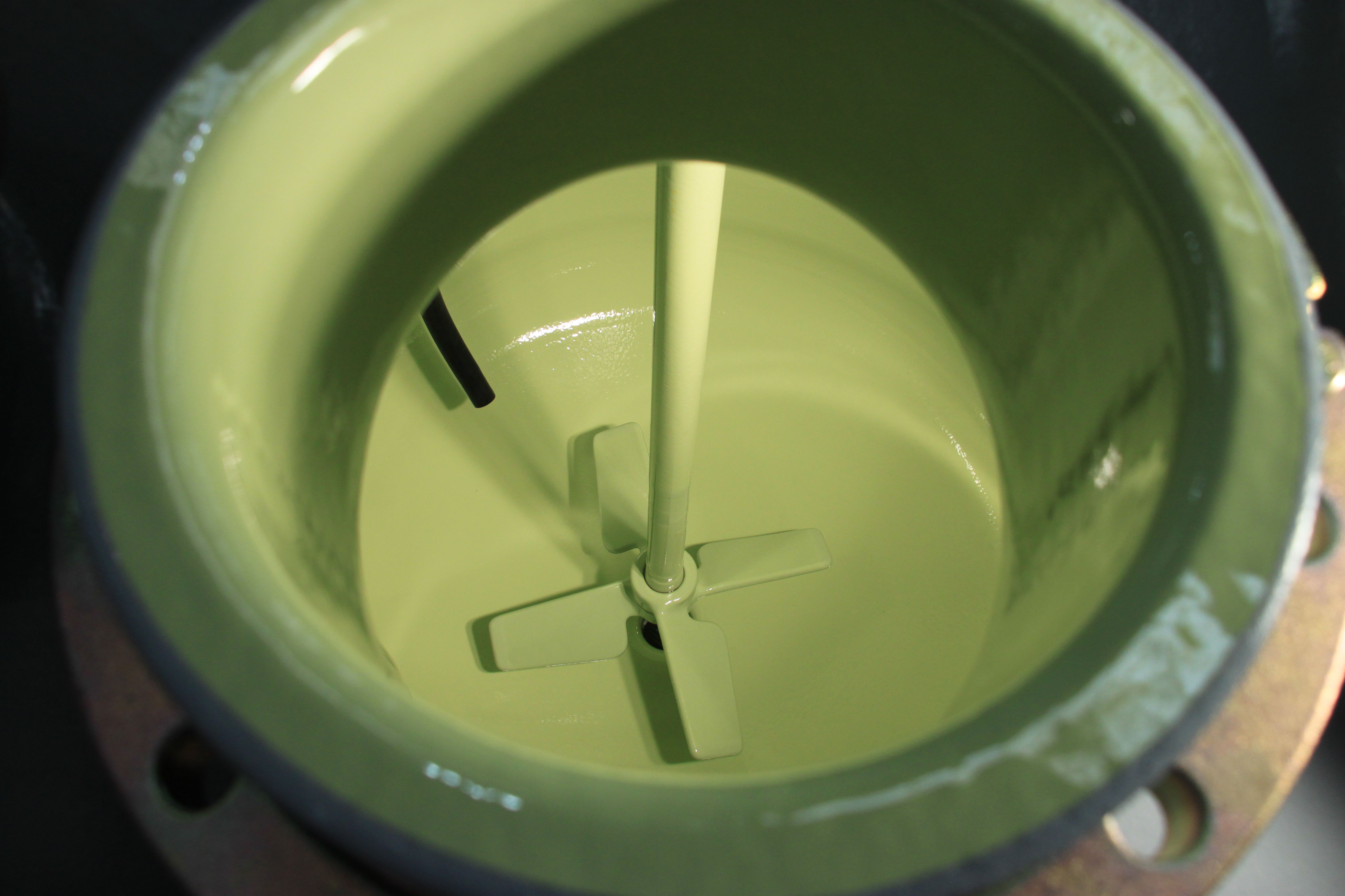 Blick in einen emaillierten Rührbehälter für biokorrosive Prozesse von Thaletec